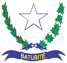 Brasão da cidade de Baturité/CE